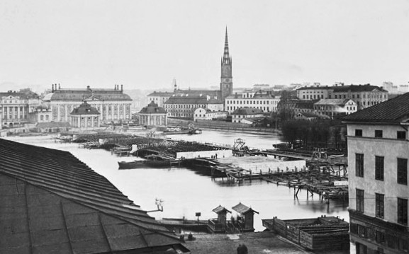 Vasabron under uppförande